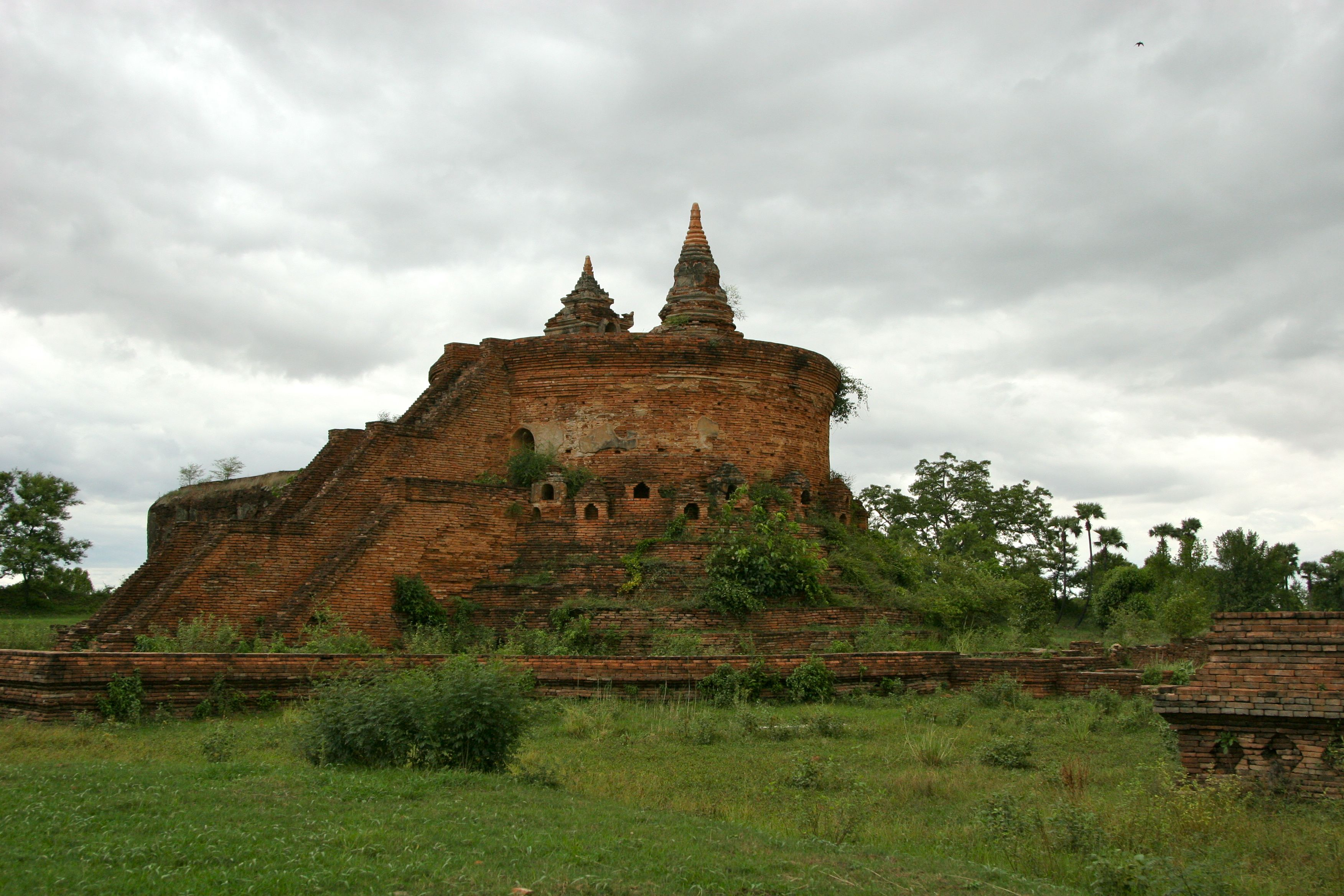 Stupa ruins, Innwa, Mandalay Division, Burma